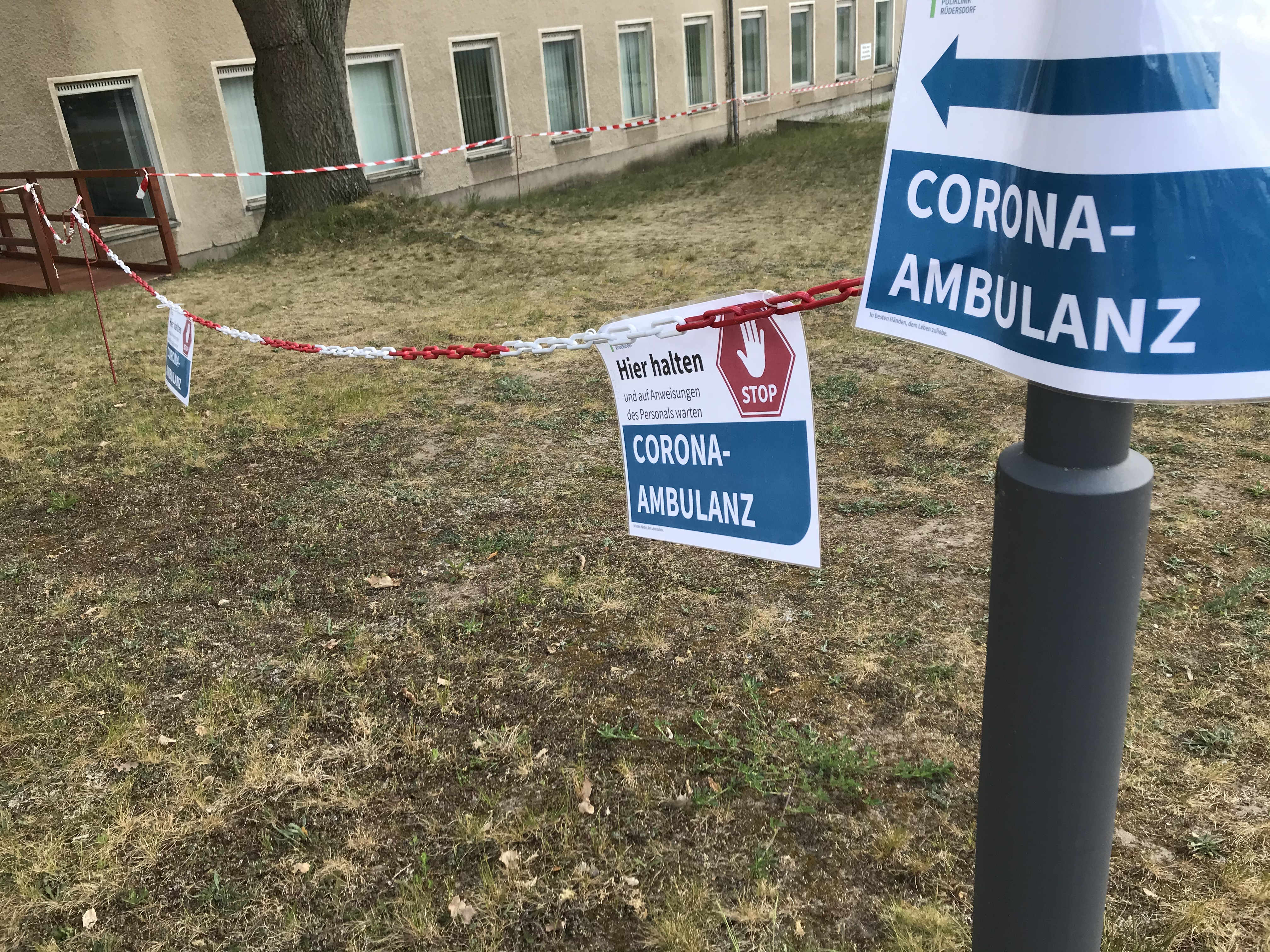 Corona-Ambulanz in Brandenburg (April 2020).